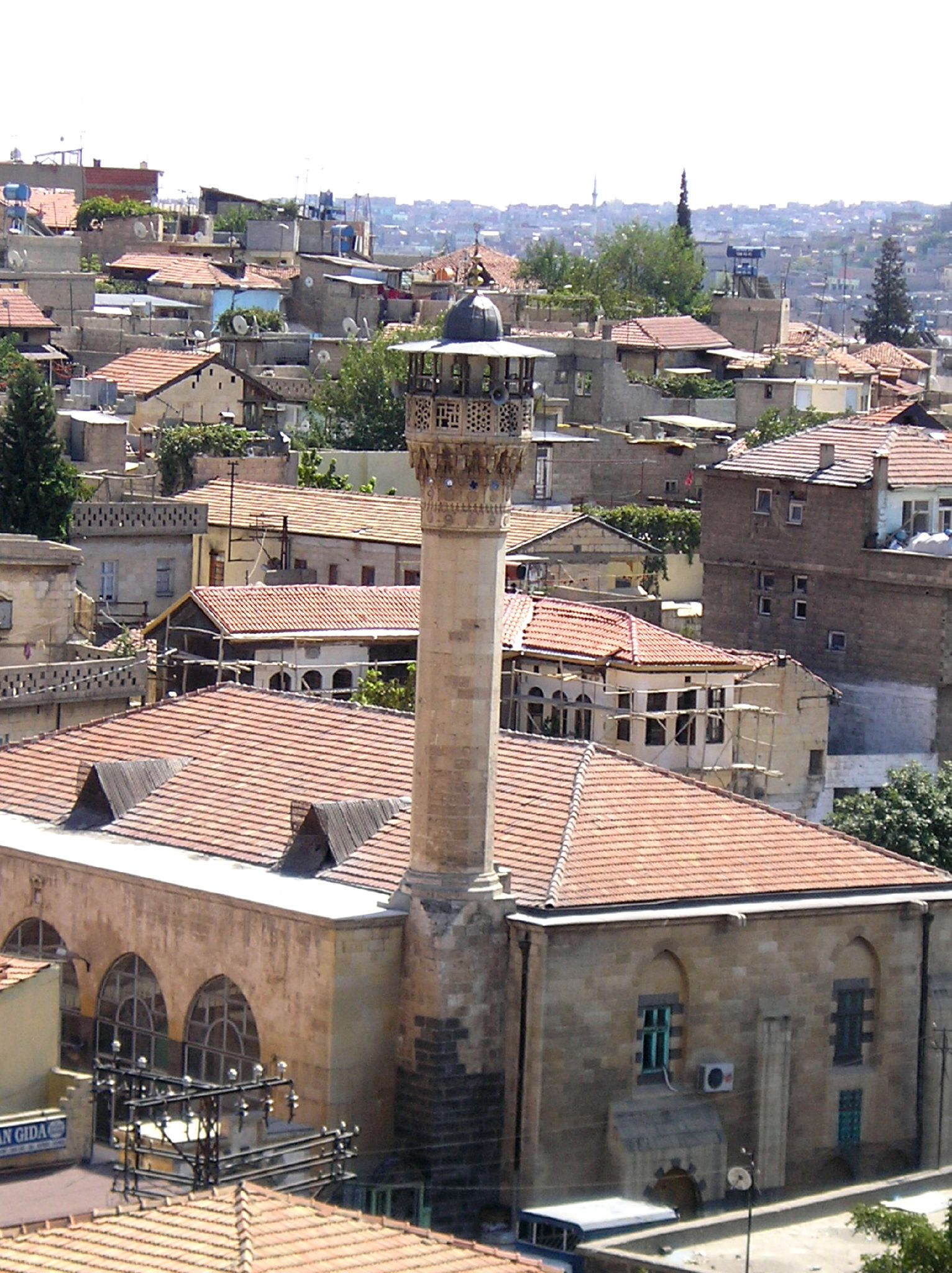 Tahtani Mosque, Gaziantep